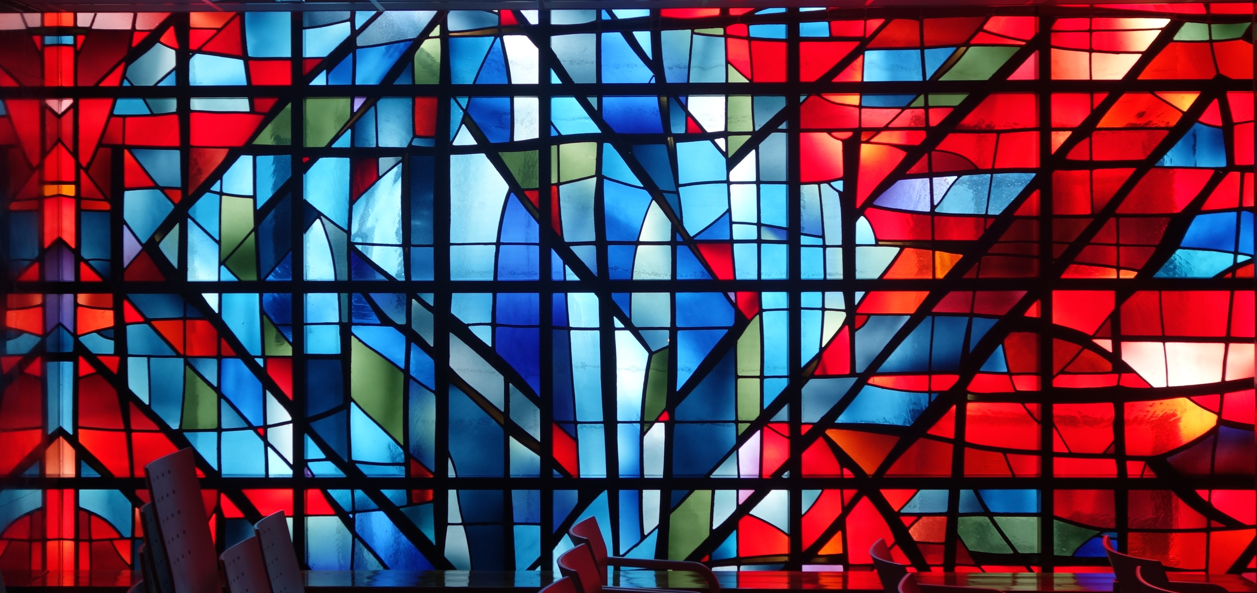 Odilo Kurka: Kapelle im Krankenhaus Kirchdorf 1965, Antikglas-Fensterwand